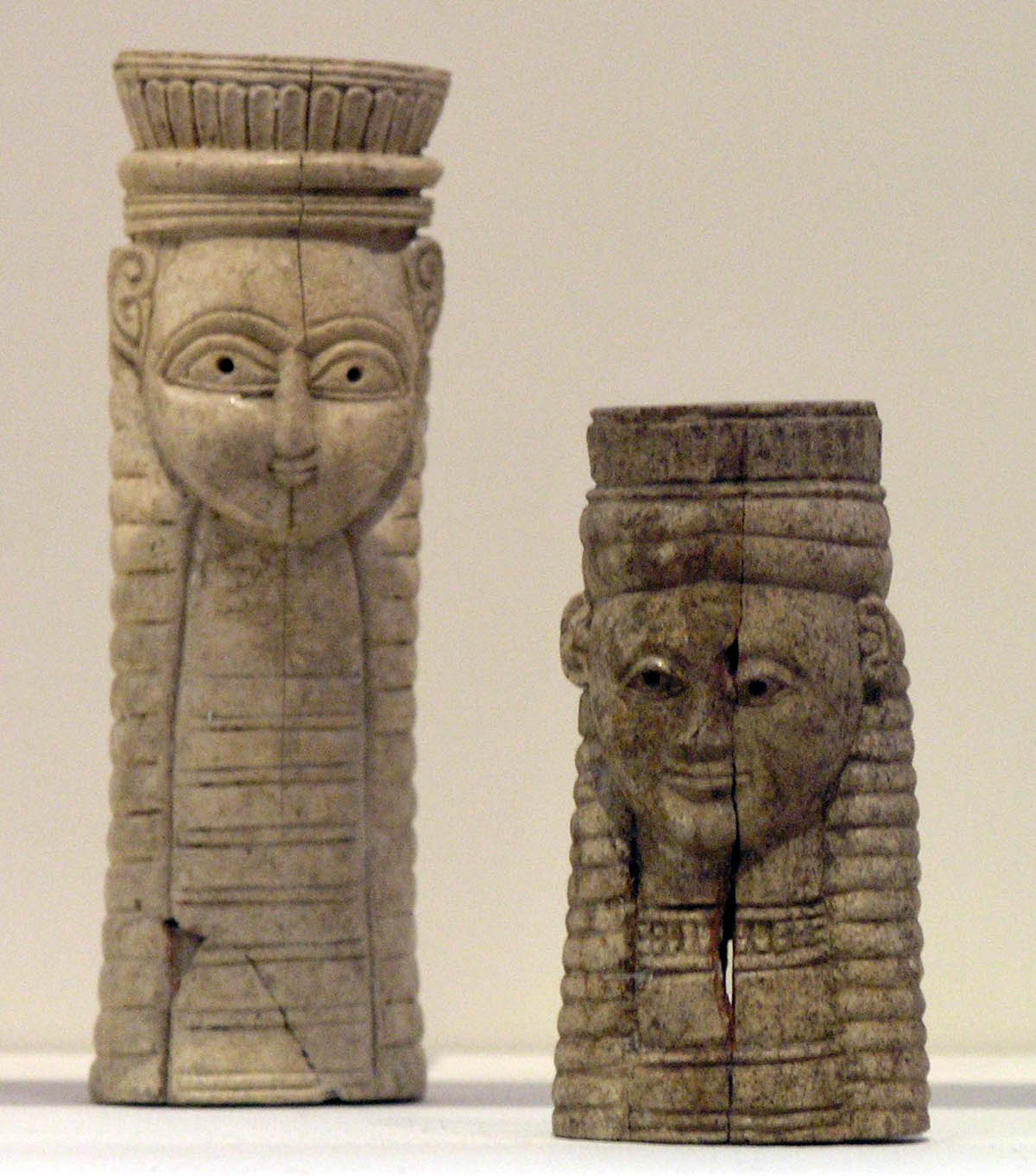 Ex-votos retrouvés au sanctuaire d'Artémis Orthia, en forme de protomés animaliers.